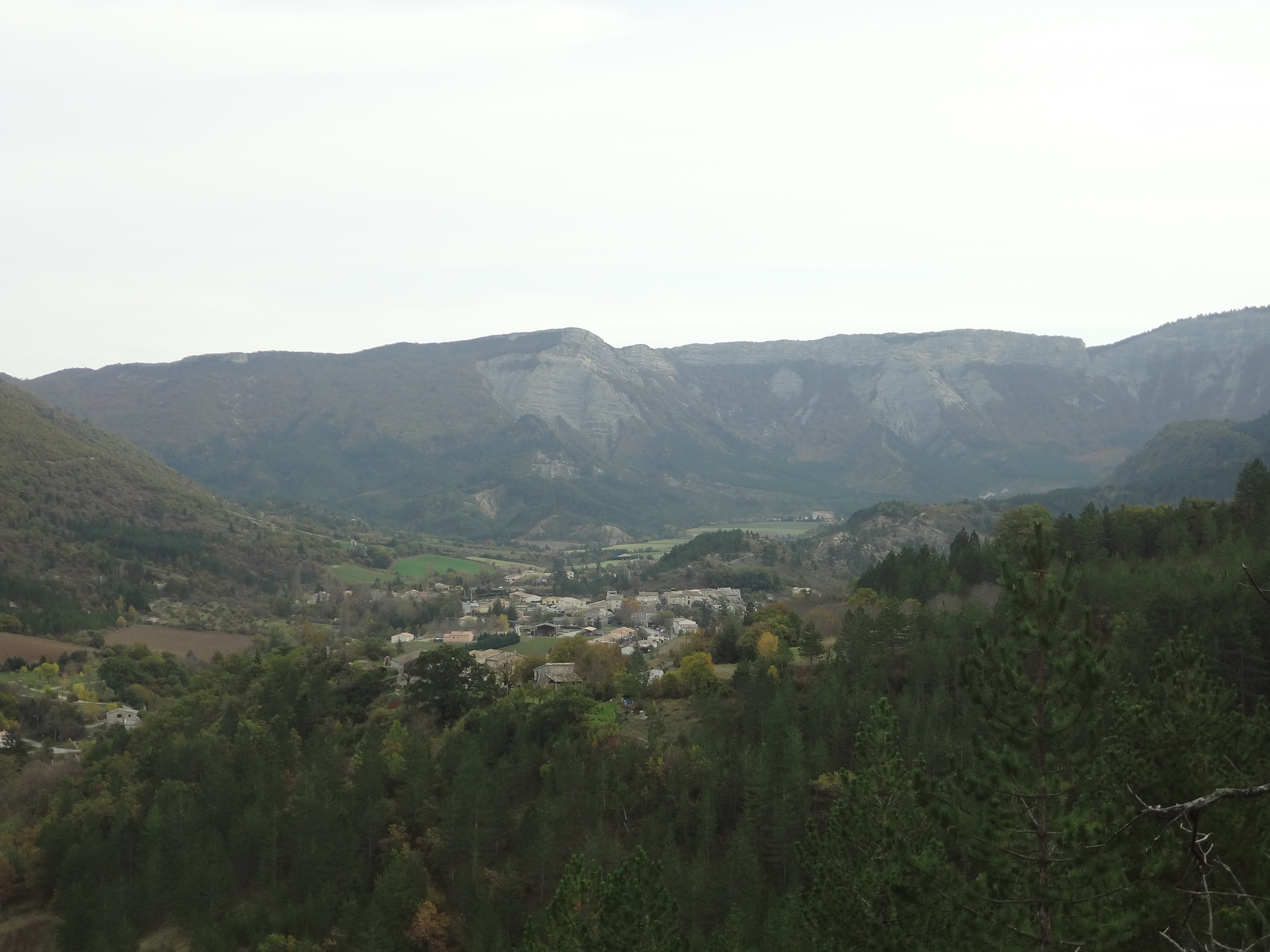 Valbelle : vallée, village et cirque